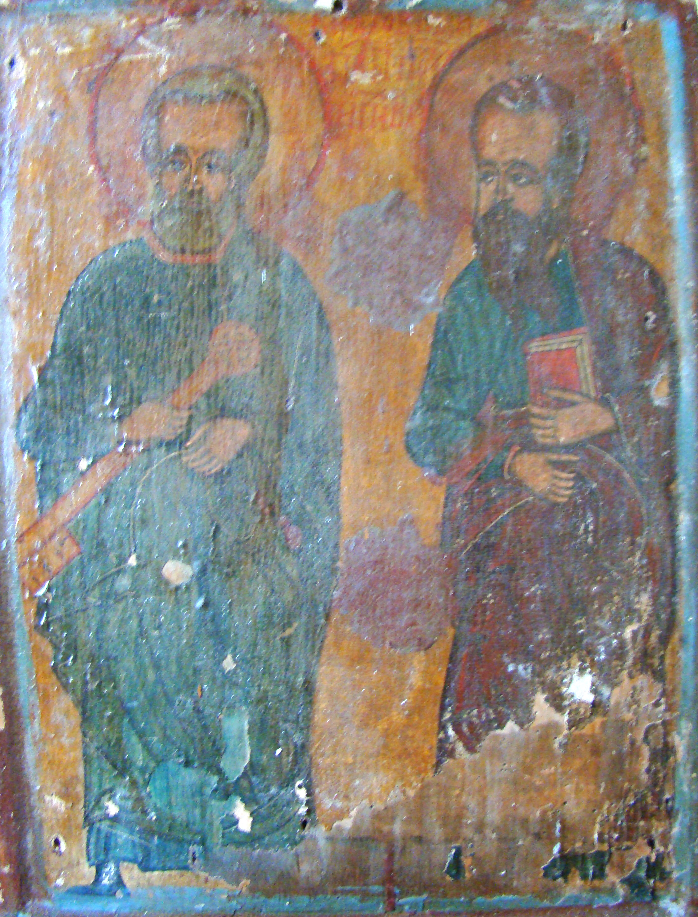 Biserica de lemn „Sf.Nicolae” din Boiereni, județul Maramureș